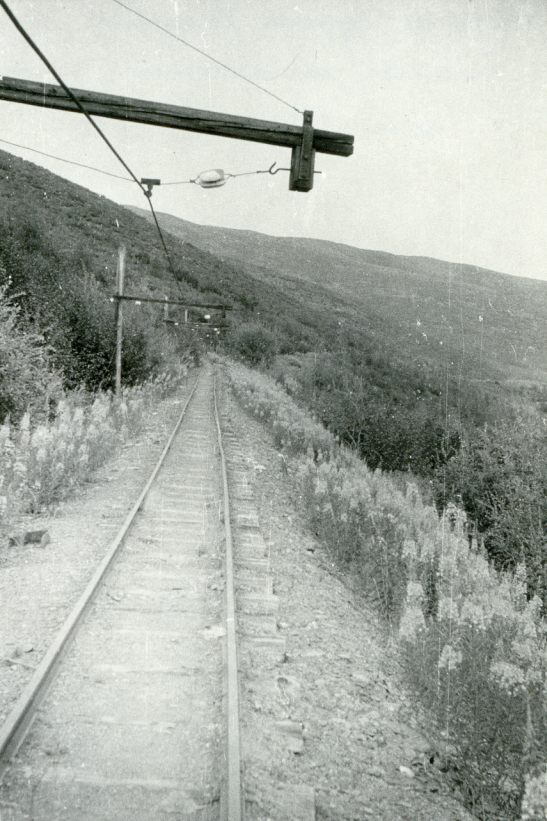 Рудничная узкоколейка